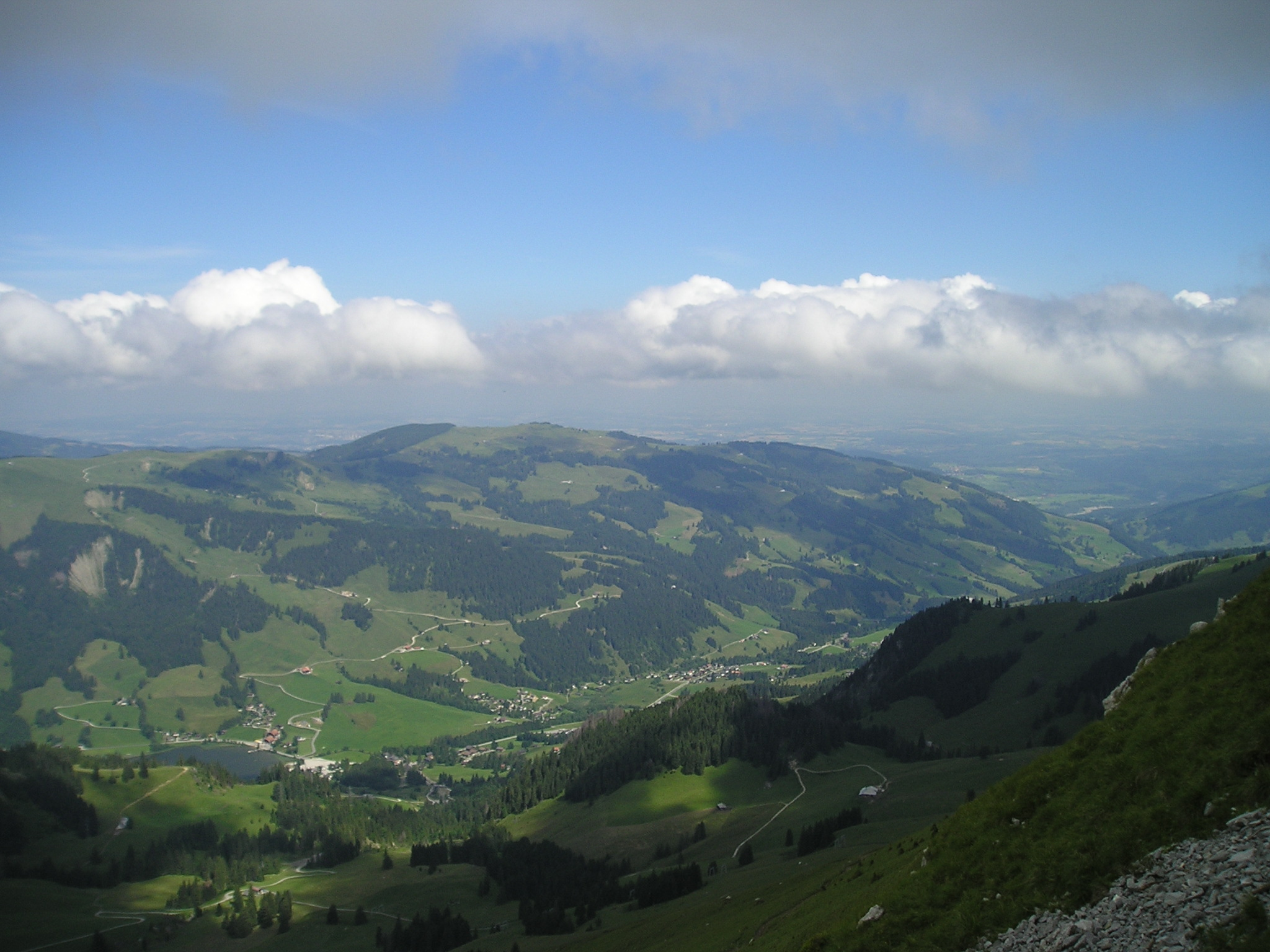 La valée du Lac Noir, Canton de Fribourg, Suisse